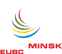 Официальный логотип чемпионата